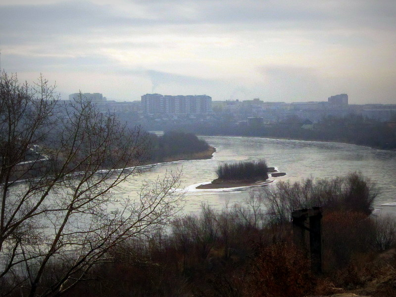 Река Уда в Улан-Удэ.